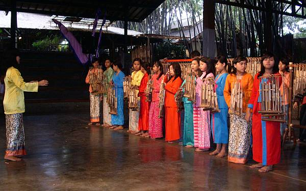 Eine Mädchengruppe beim Angklung spielen im Saung Mang Udjo, Bandung, Indonesien.